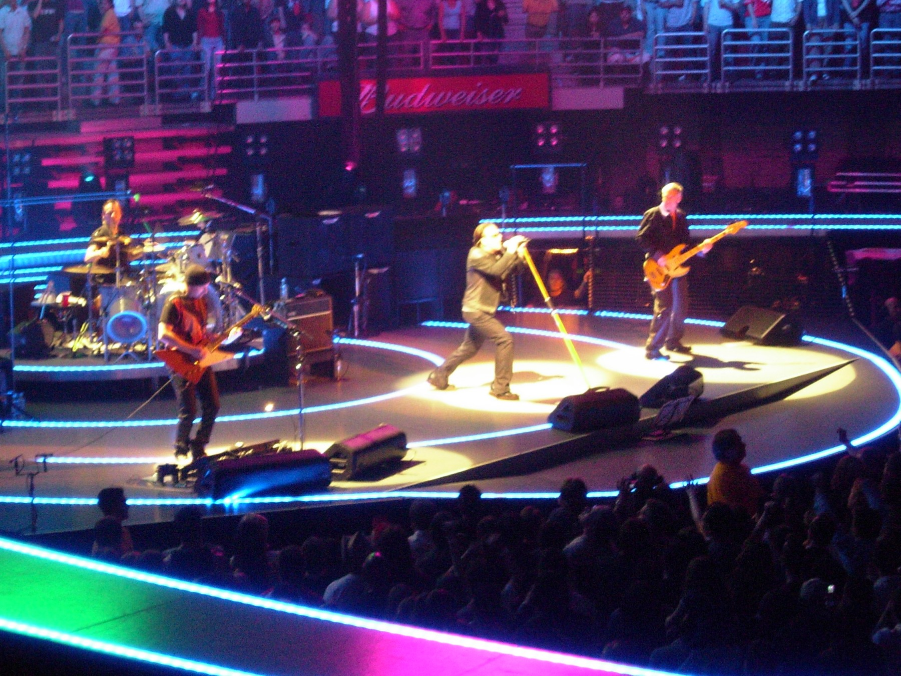 Ver-ti-go